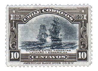 Estampilla de 10 centavos, conmemorativa del Centenario de Chile. Imagen escaneada de la colección personal de Usuario:Sfs90, enero de 2010.